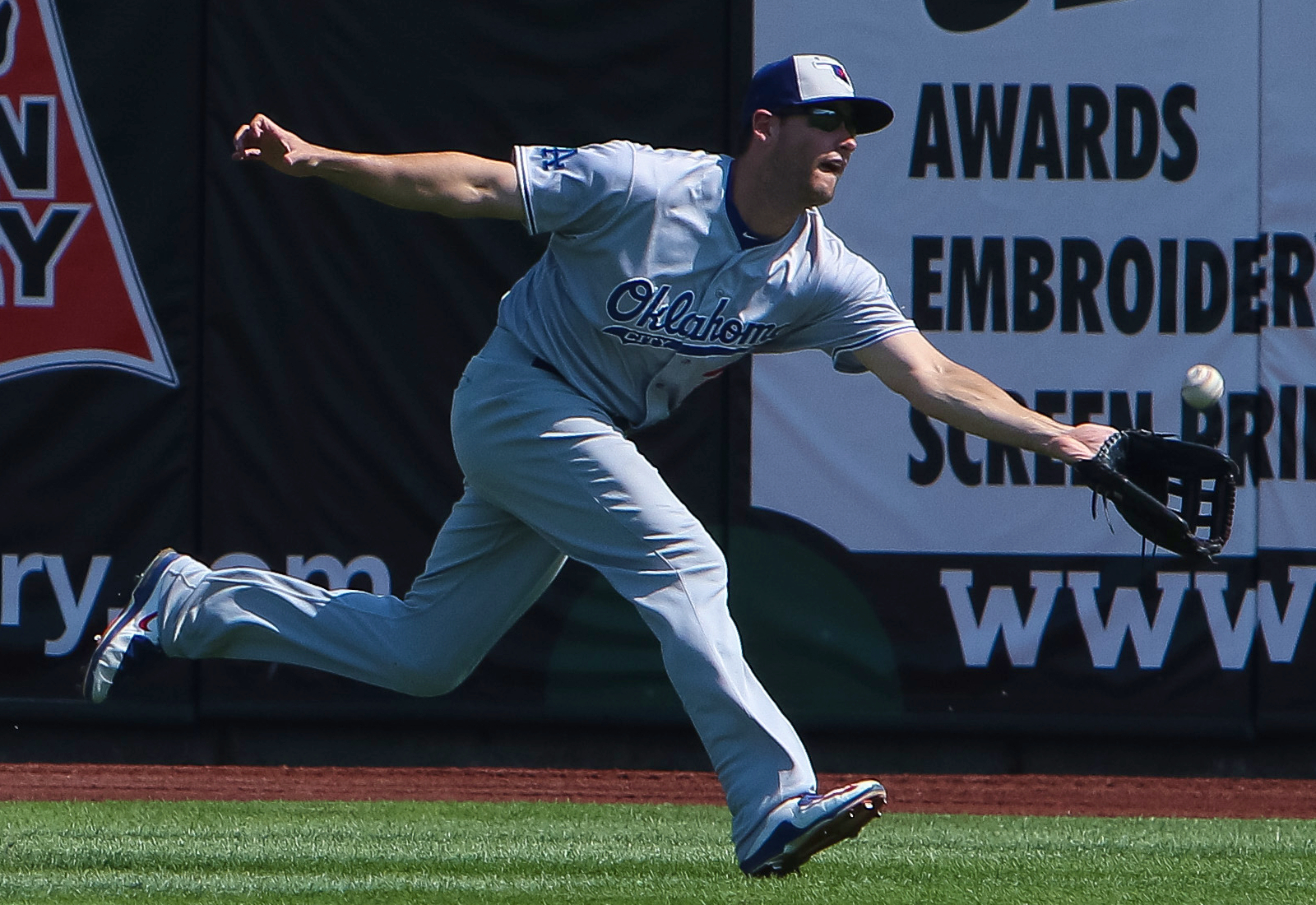 Alex Hassan